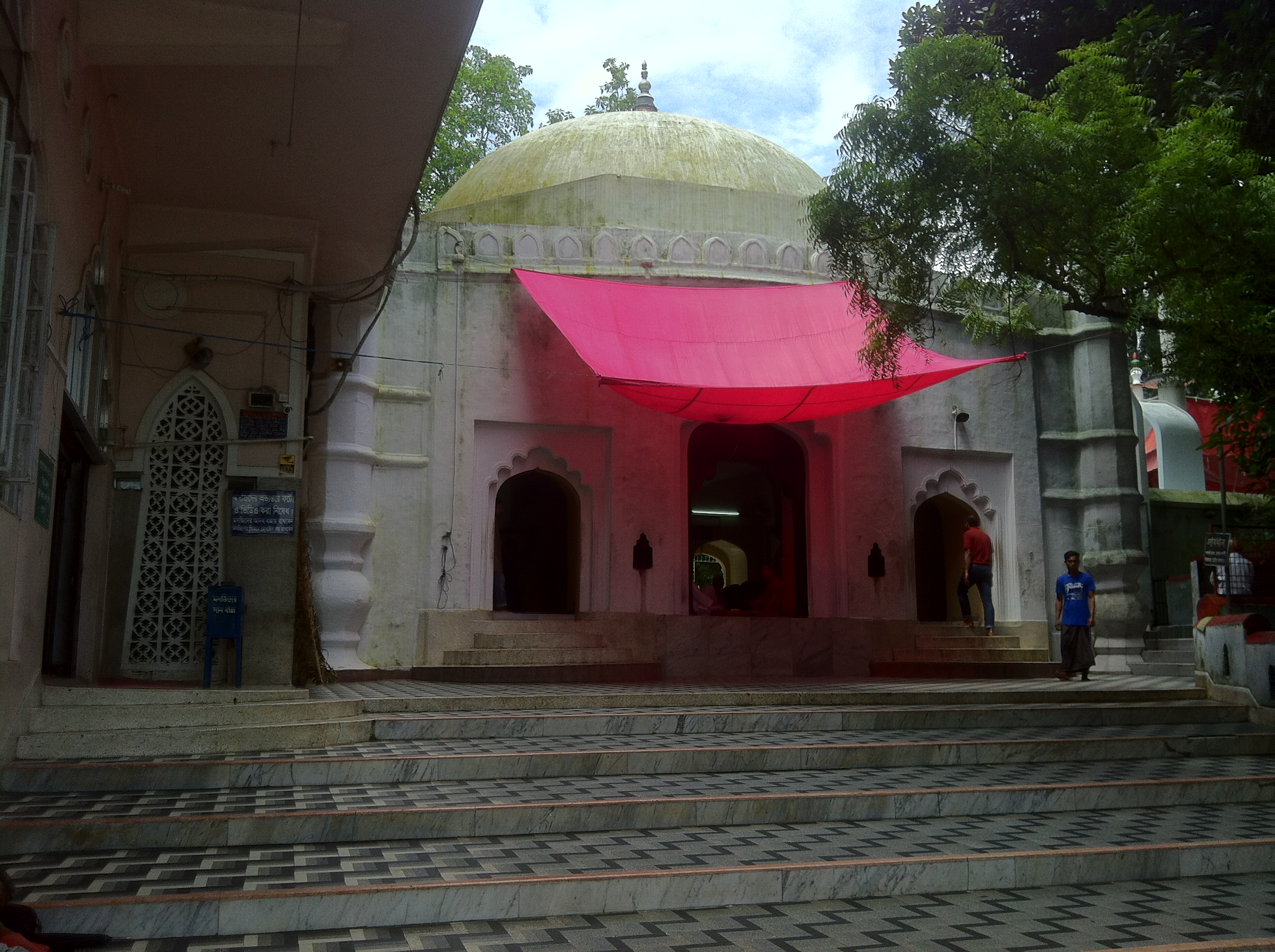 হযরত শাহজালালের দরগাহ